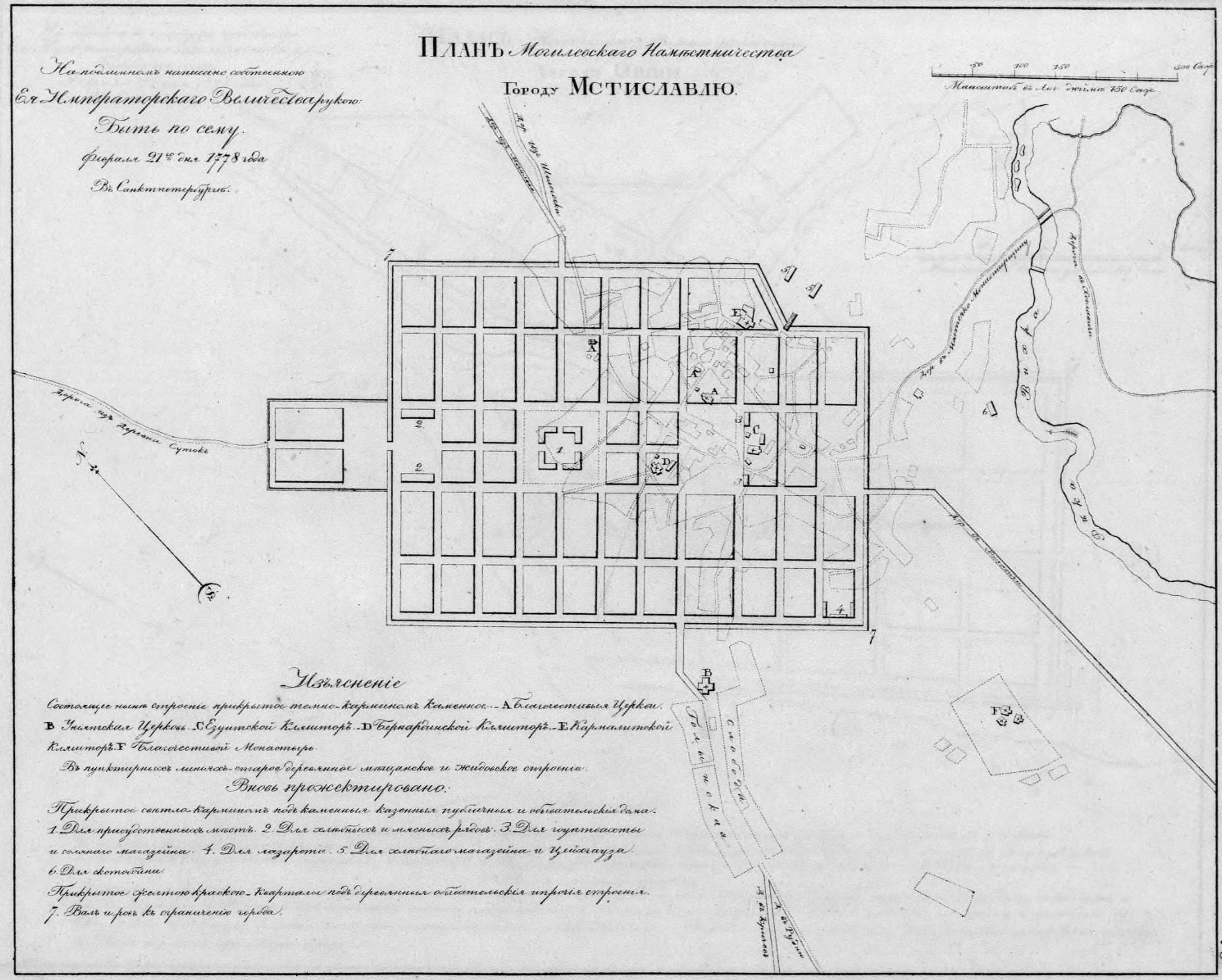 Полное Собрание Законов Российской Империи. Собрание первое. Книга чертежей и рисунков. (Планы городов).; 1839, Санктпетербургъ, Въ Типографіи II Отделенія Собственной Е. И. В. Канцеляріи.